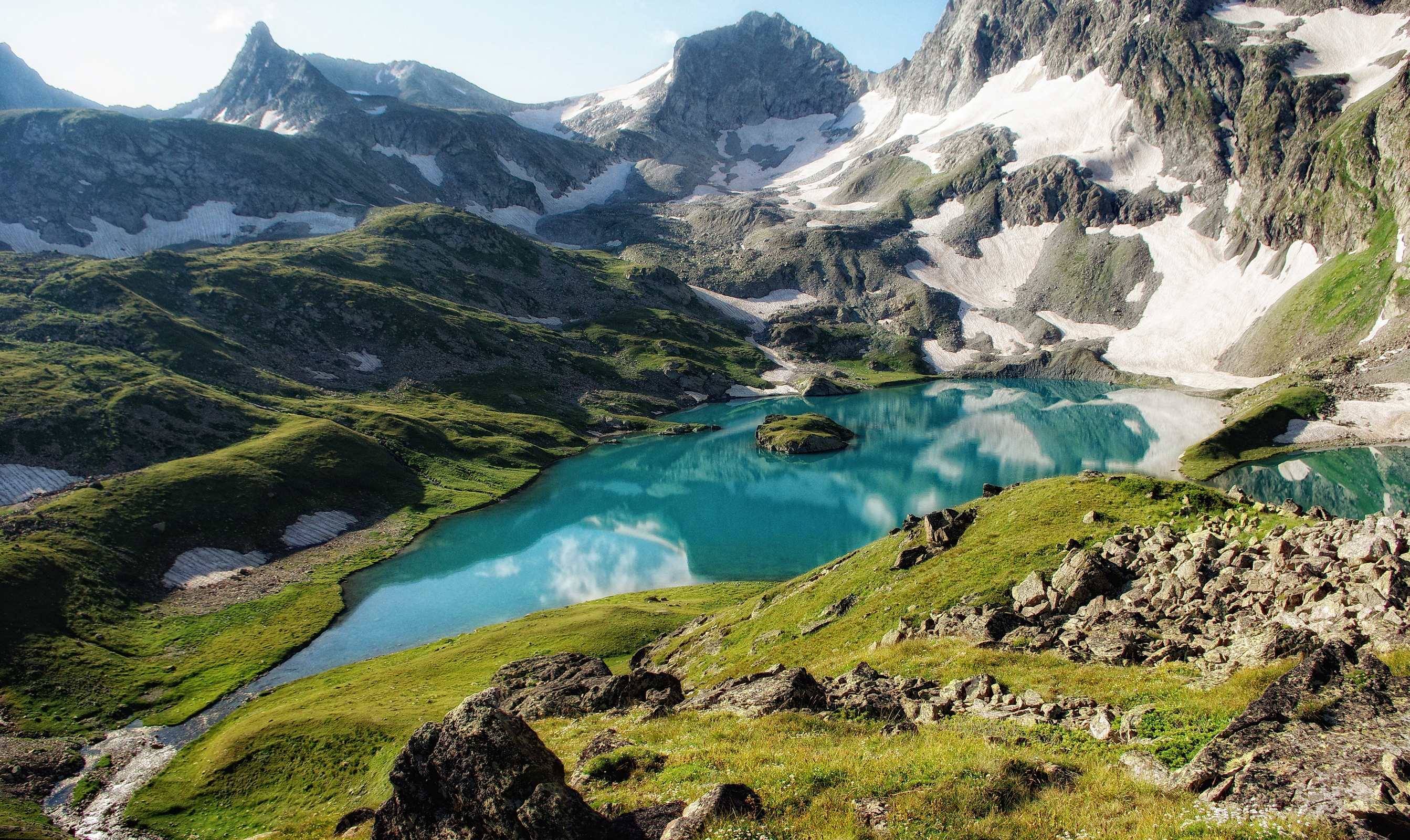 Кавказский заповедник, Урупский район озеро Безмолвия (большое Имеретинское) This image is related to the protected area of Russia number 0900057